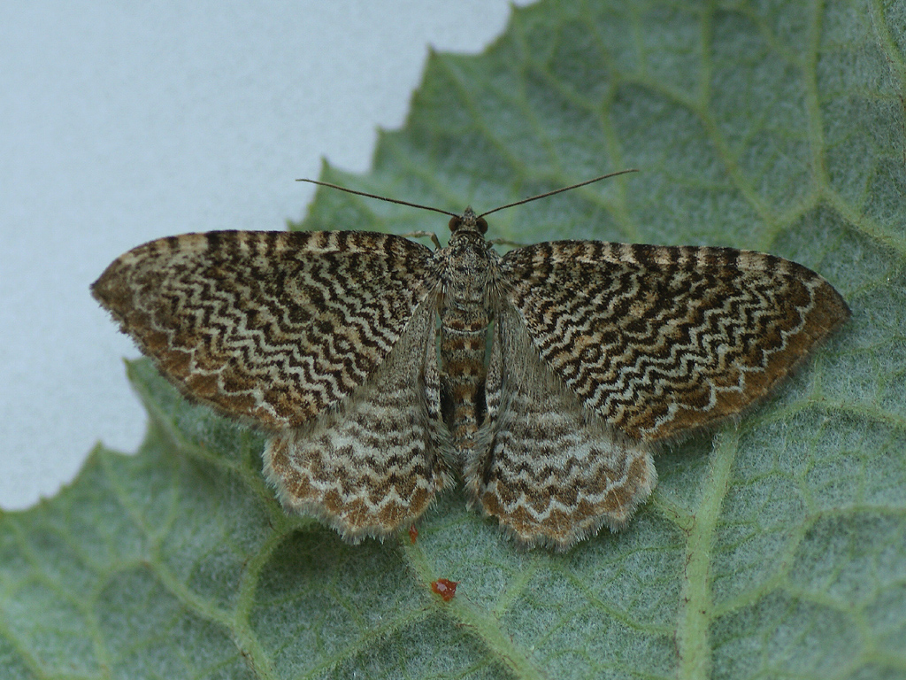 Exemplar found: Russia, Moscow Oblast, Odintsovsky District, near village Pestovo, 07.06.2014, by light МО, Одинцовский р-н, окрестности деревни Пестово, 07.06.2014, на свет